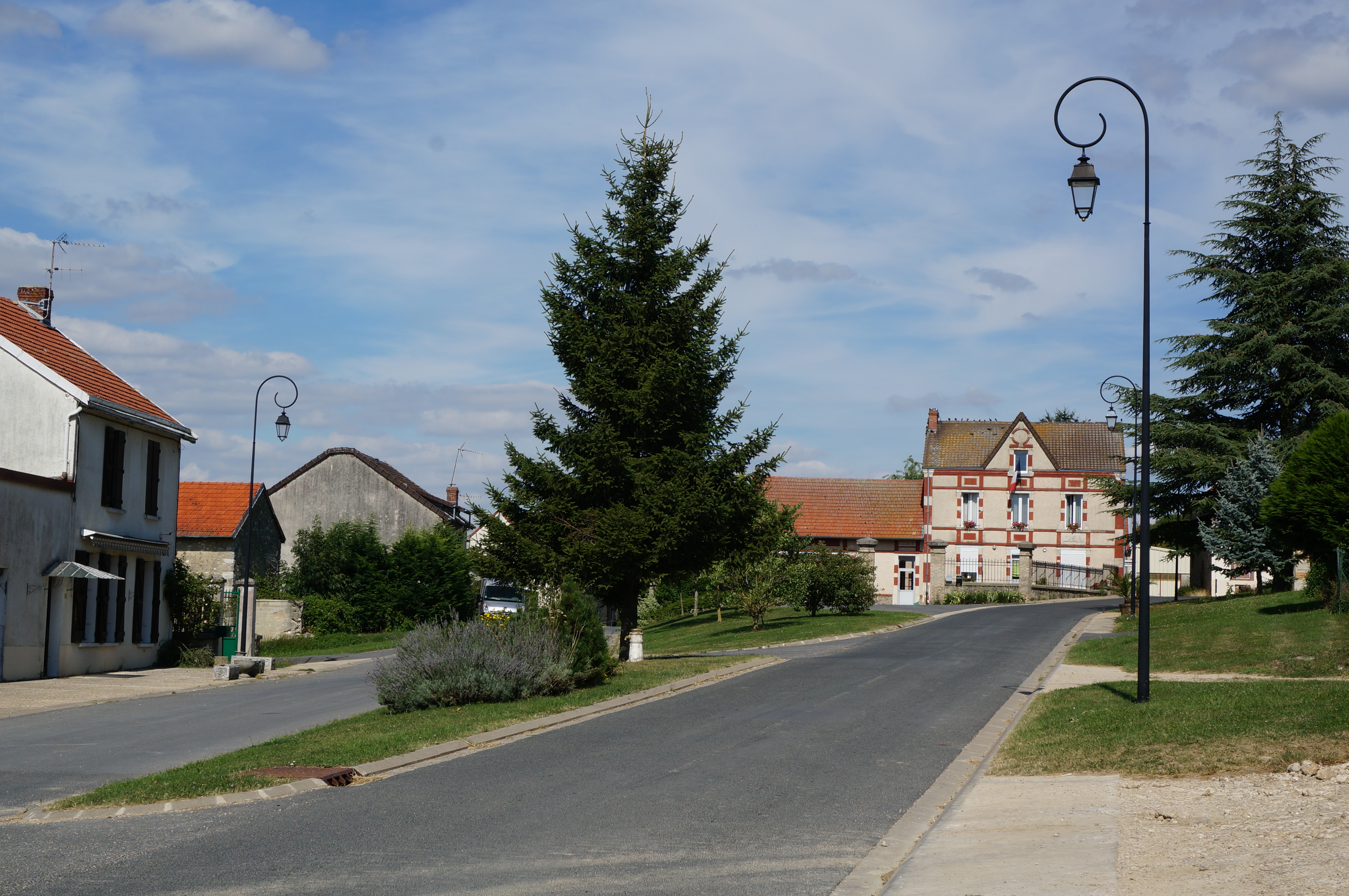 Vue de la Mairie/école.